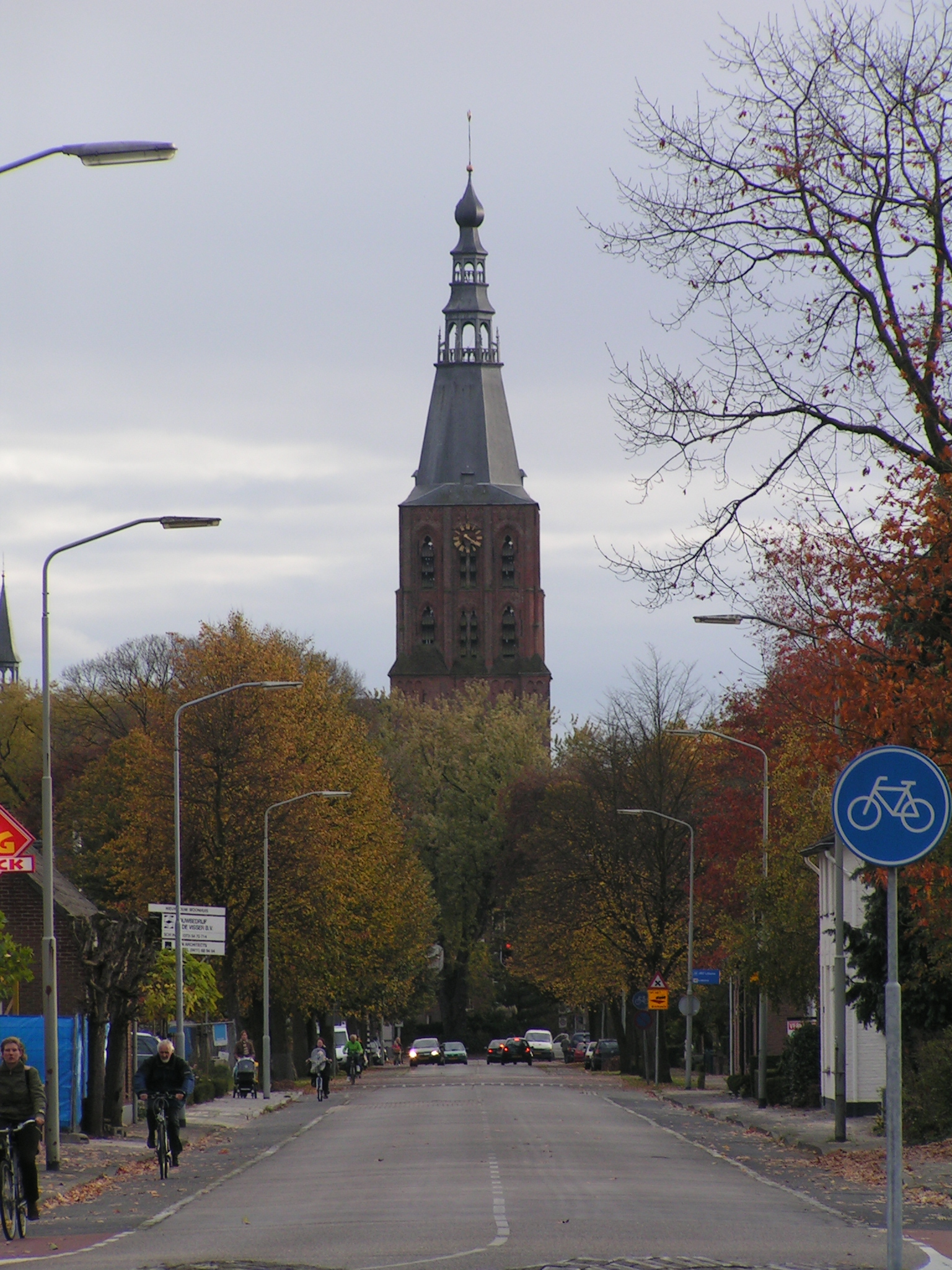 Sint-Petruskerk, Boxtel, the Netherlands